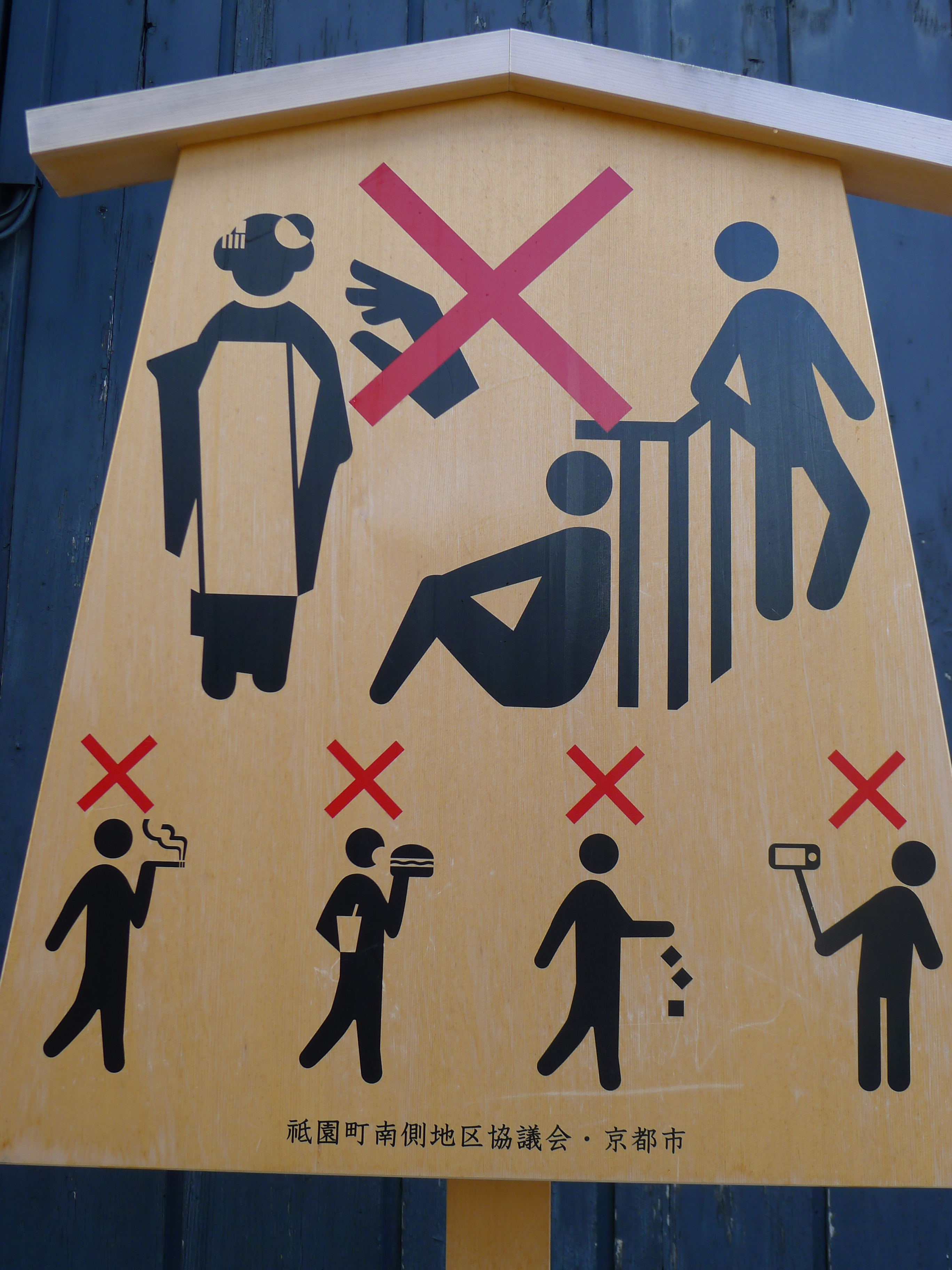 京都八坂神社界隈での外国人向け注意事項啓蒙ピクトグラム